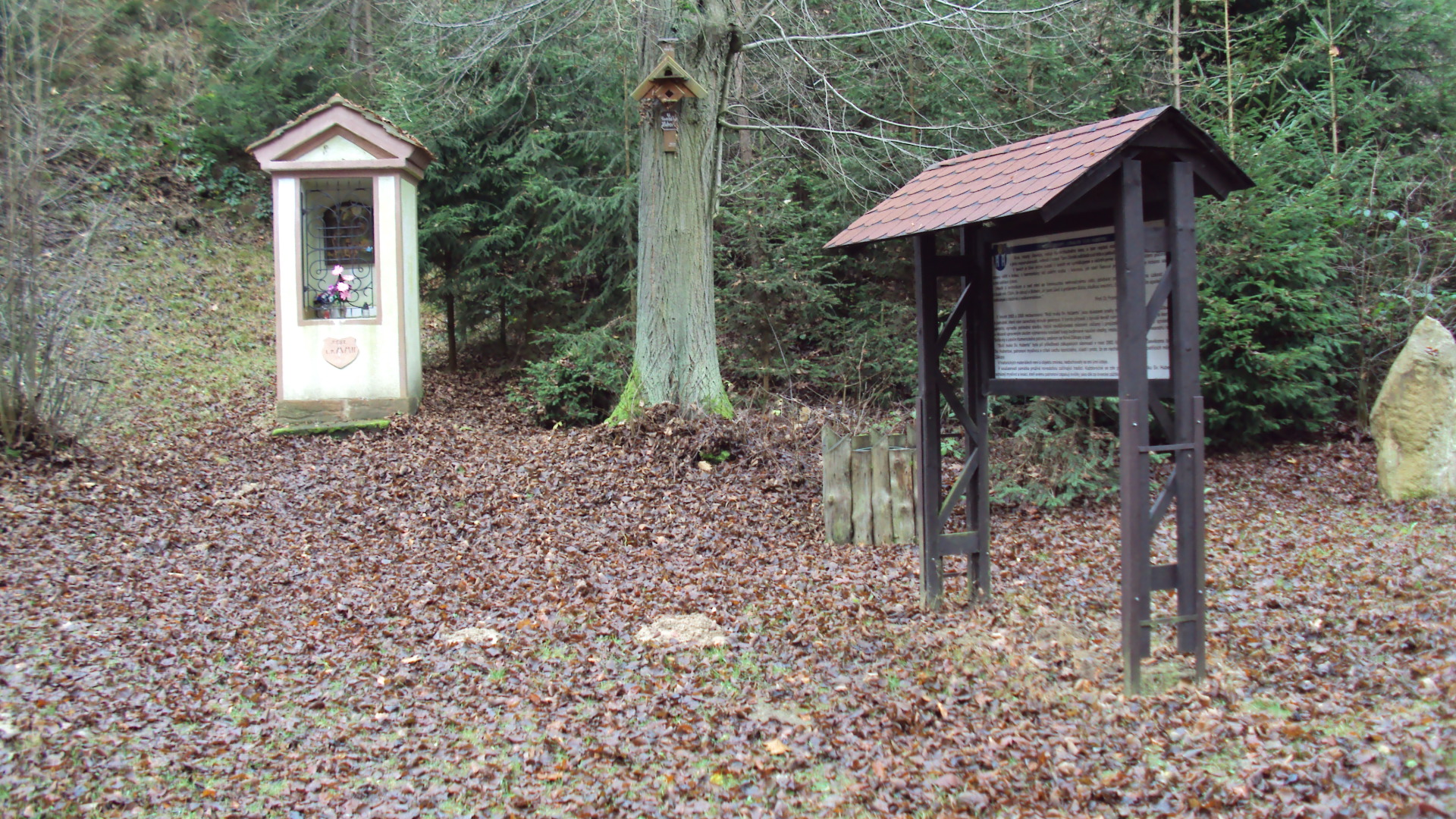 Naučná stezka, údolí Kamenického potoka u Zákup